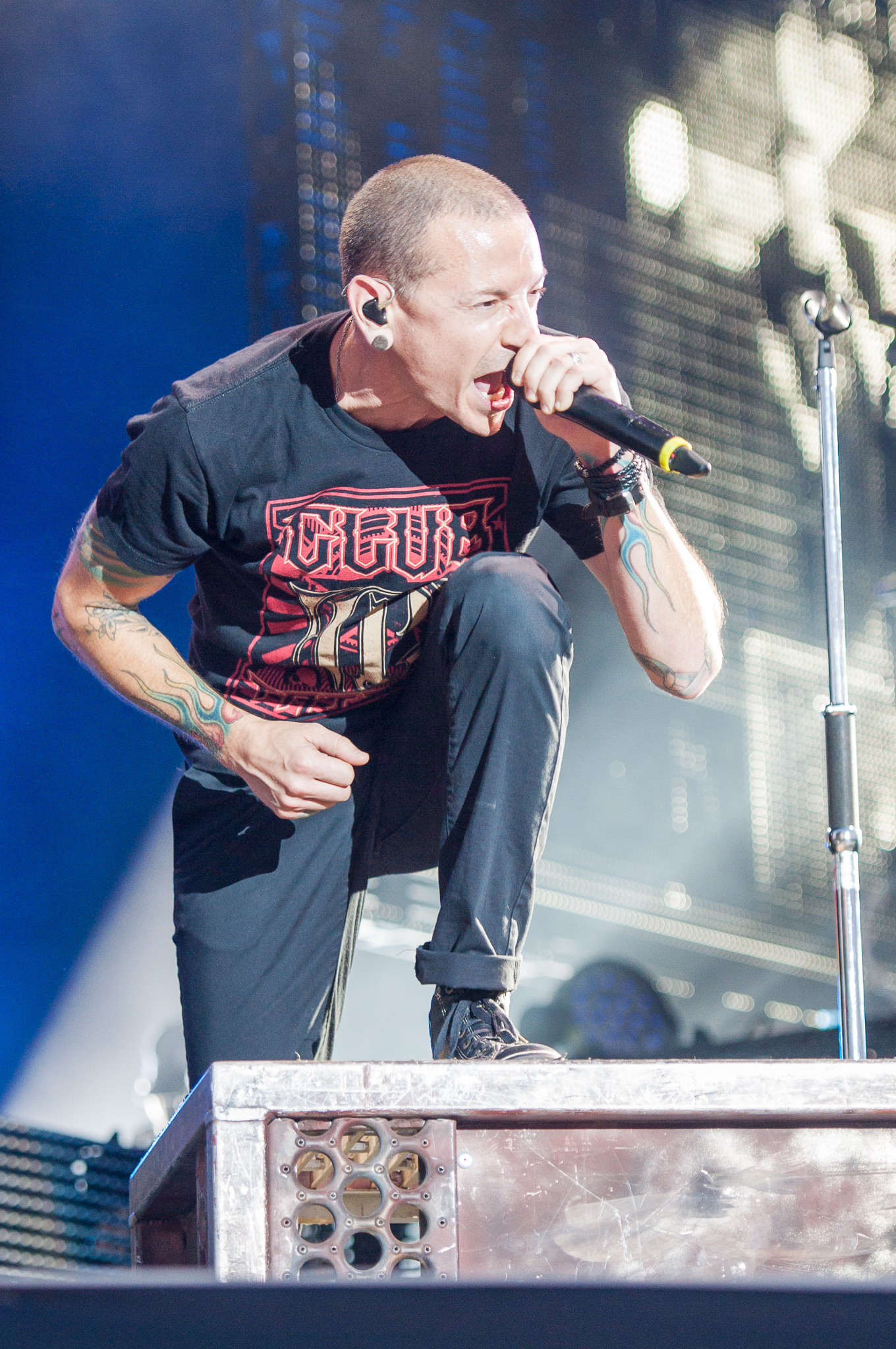 ARGO-Konzerte,Centerstage,Chester Bennington,Konzert,Linkin Park,Livekonzert,Livemusik,Musik,RiP,Rock im Park 2014